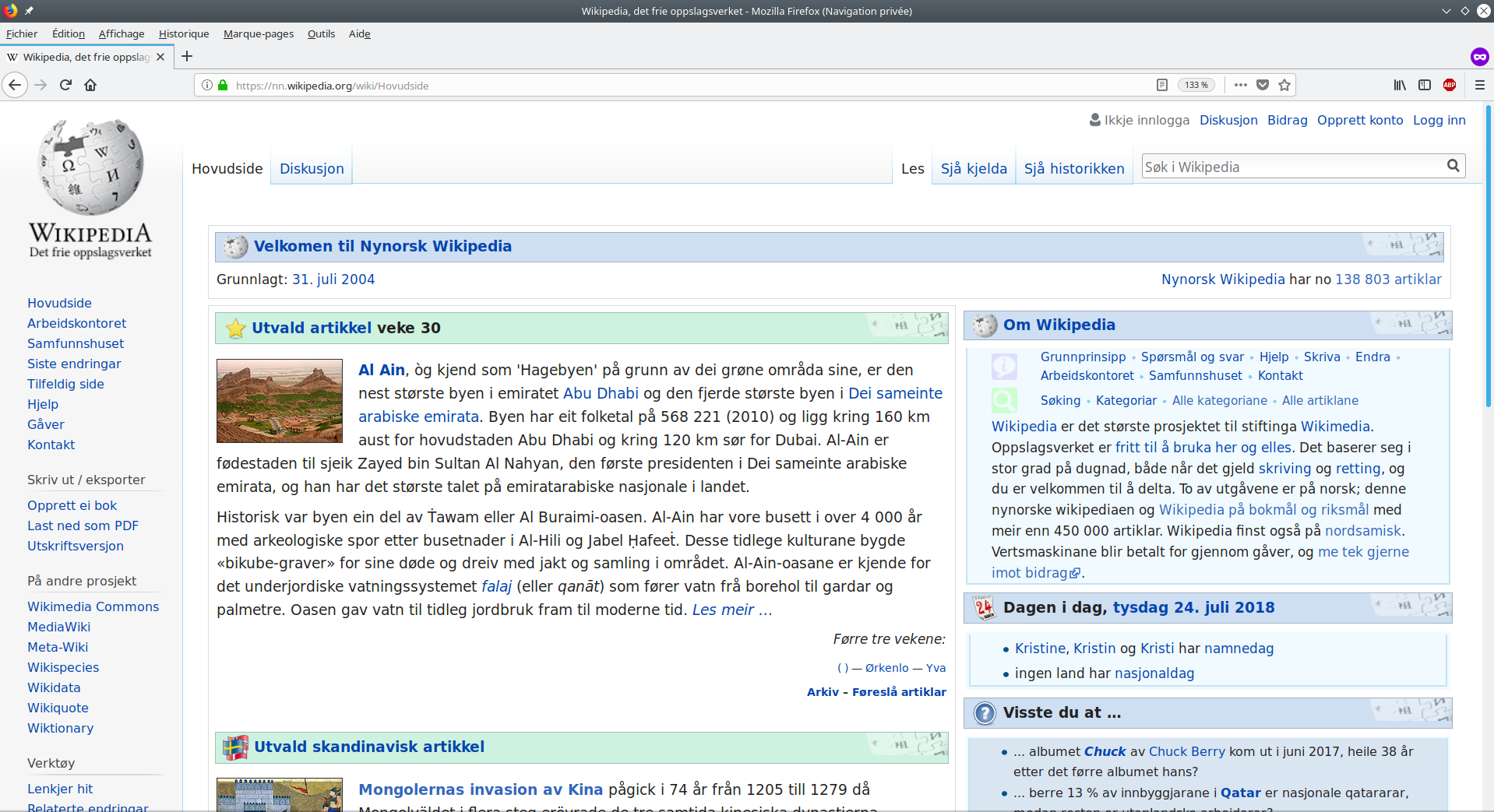 Skjermdump av Firefox 61.01 for Ubuntu